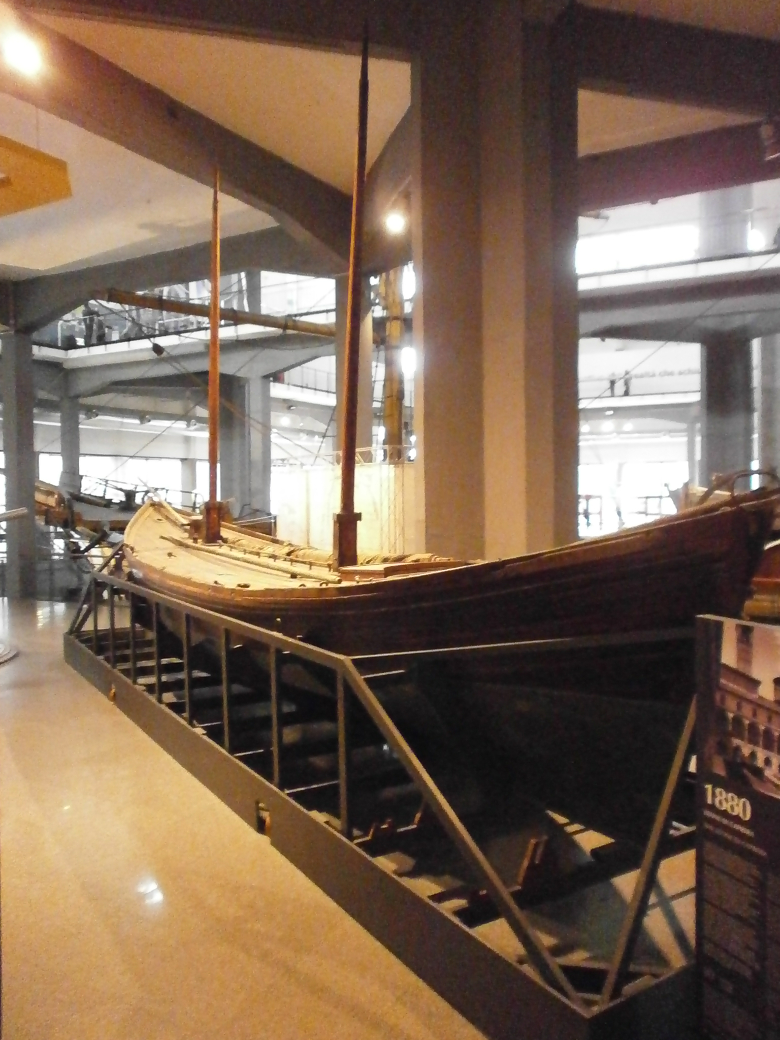 Goletta LEONE DI CAPRERA - 1880 - Museo della Scienza e della Tecnica - Milano - Il Leone di Caprera è la goletta con cui nel 1880 V.Fondacaro, O.Grassoni e P. Troccoli raggiunsero Garibaldi a Caprera partendo da Montevideo per consegnargli le firme degli immigrati Italiani in Uruguay. Lunghezza:10,7m – Larghezza 2,5m – Altezza 6,5m